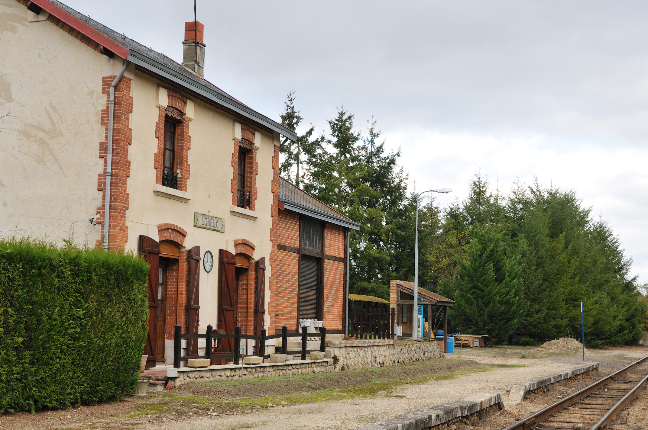 Ancien bâtiment désaffecté (aujourd'hui propriété privée) de la gare de Loreux, Loir-et-Cher, France